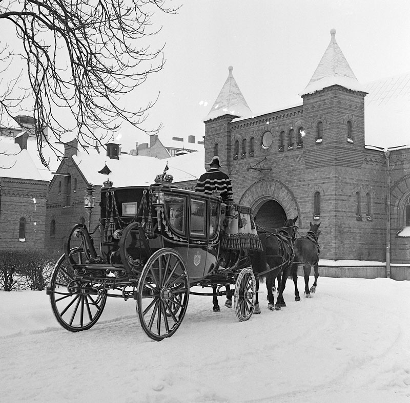 Sjuglasvagnen utanför Kungliga Hovstallet vid Väpnargatan